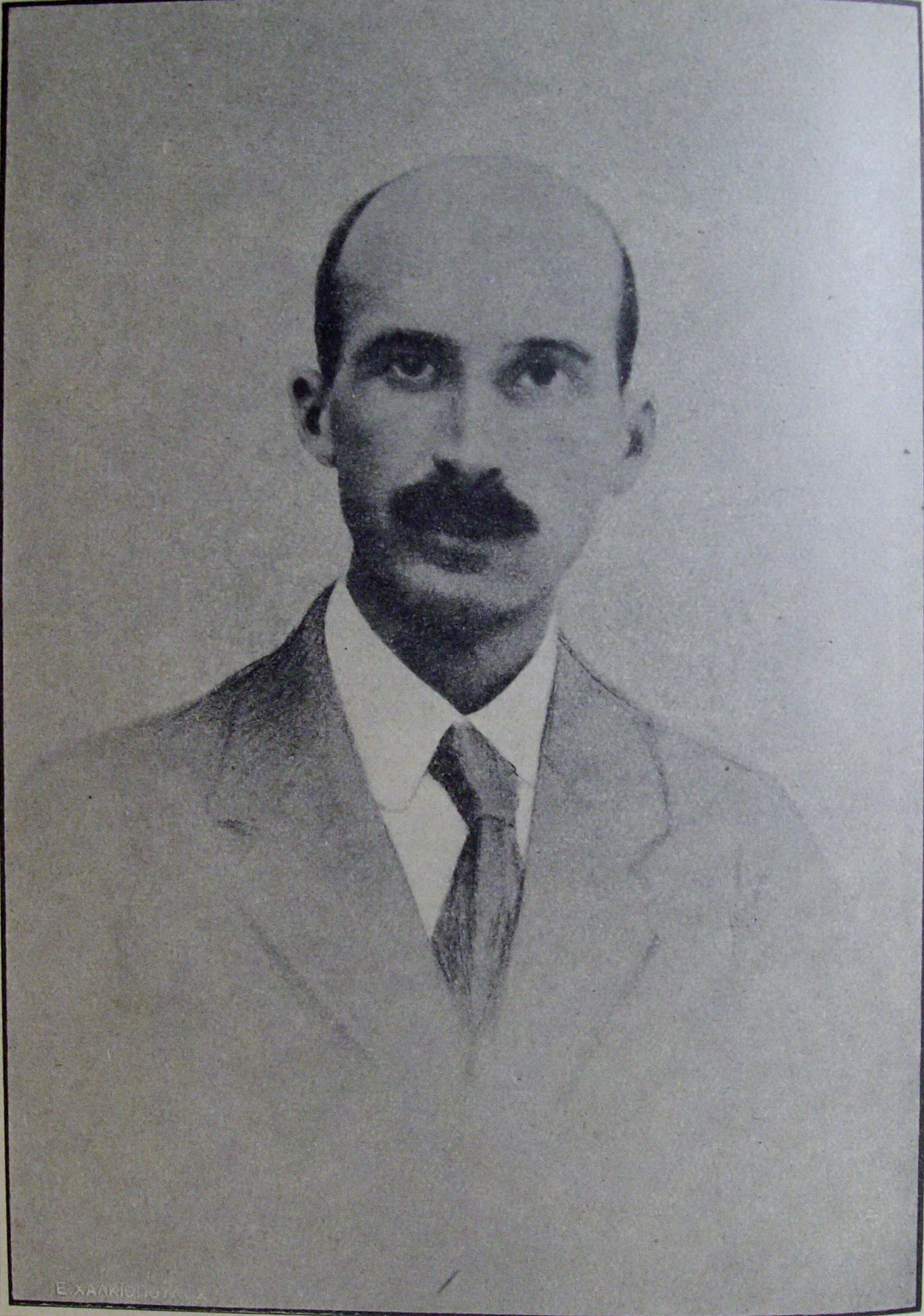 Τσακαλώτος Δημήτριος